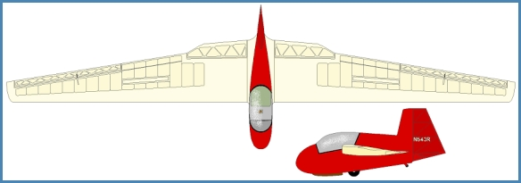 Marske Pioneer 2a